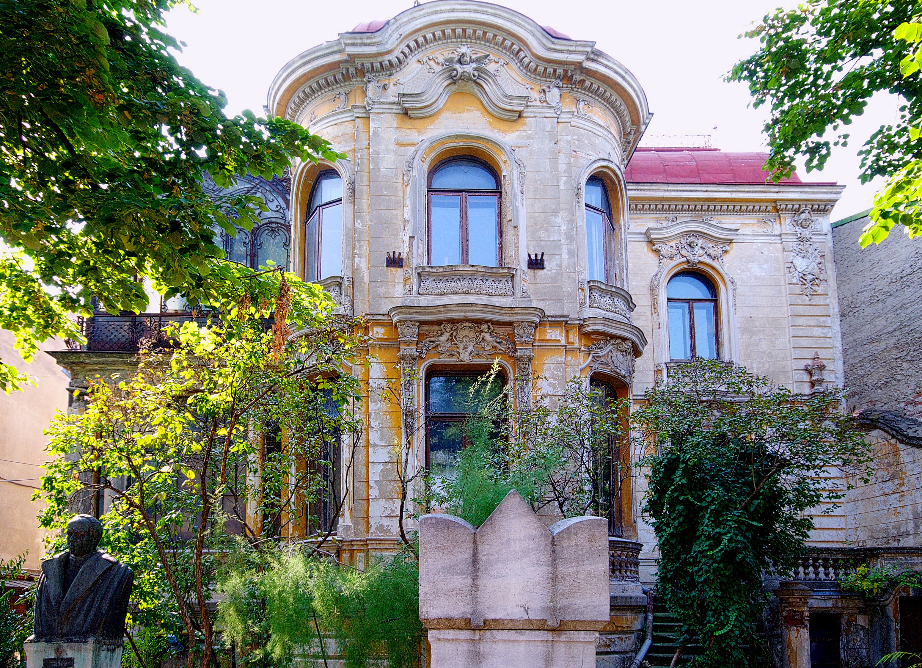 Casa Macca - Institutul de Arheologie "Vasile Pârvan", Henri Coandă 11